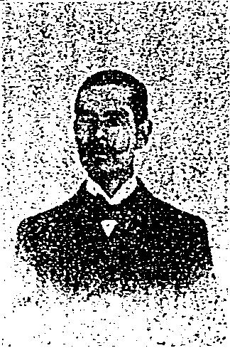 Shigeru Iwamura